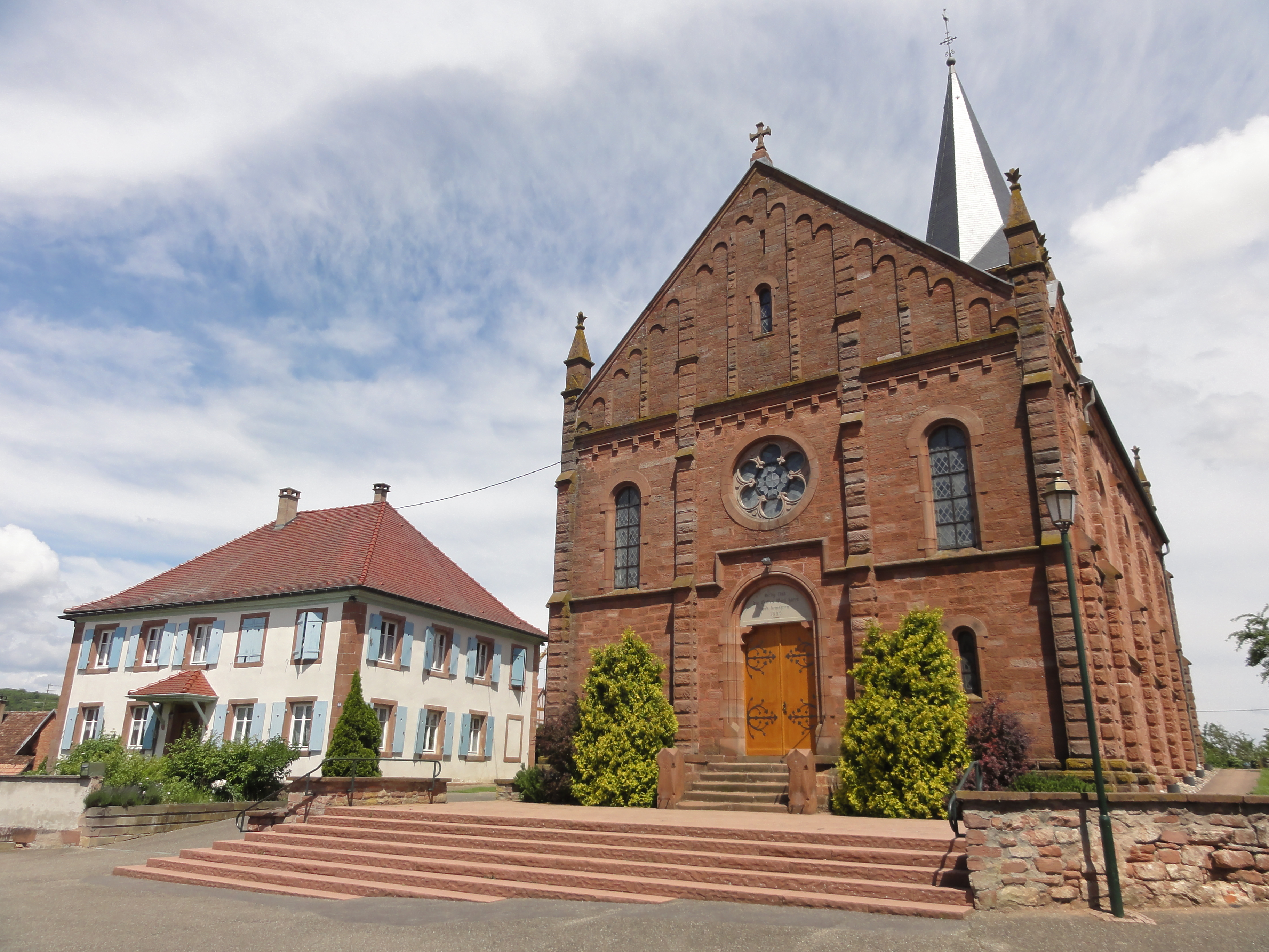 Alsace, Bas-Rhin, Printzheim, Église protestante (XIIIe-XIVe, XVIIIe-XIXe)